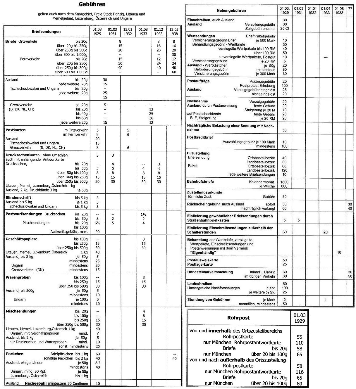 Reichspost, Tarife bis 1945